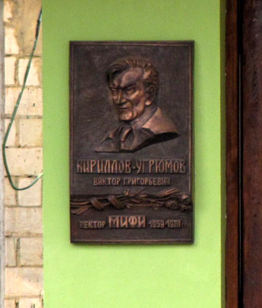 Российский учёный, ректор МИФИ Виктор Григорьевич Кириллов-Угрюмов. Мемориальная доска перед главным входом в МИФИ